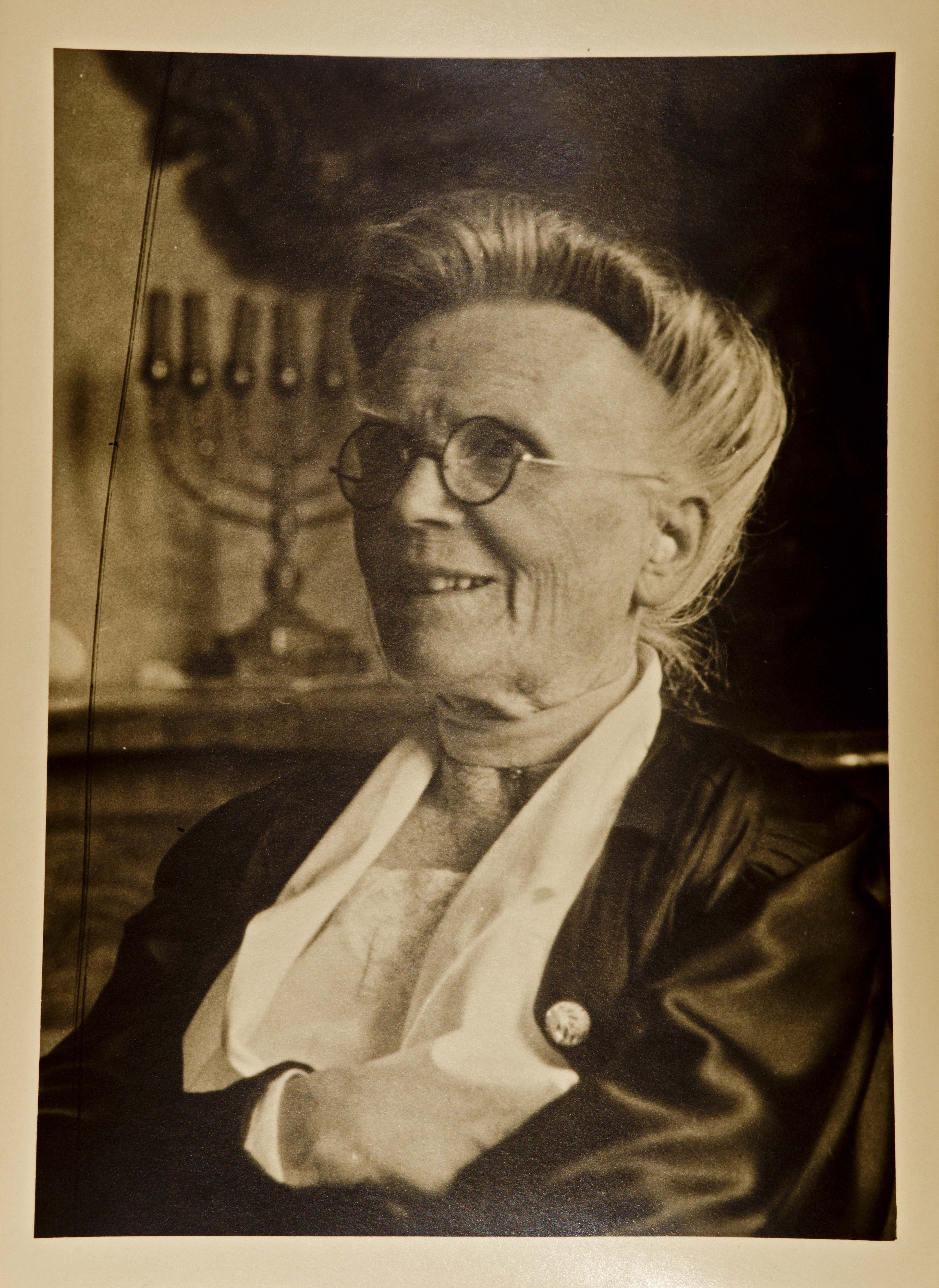 Porträtfoto von Elisabeth Eitel geb. Hoffmann (1872–1961), Ehefrau von Albert Eitel.